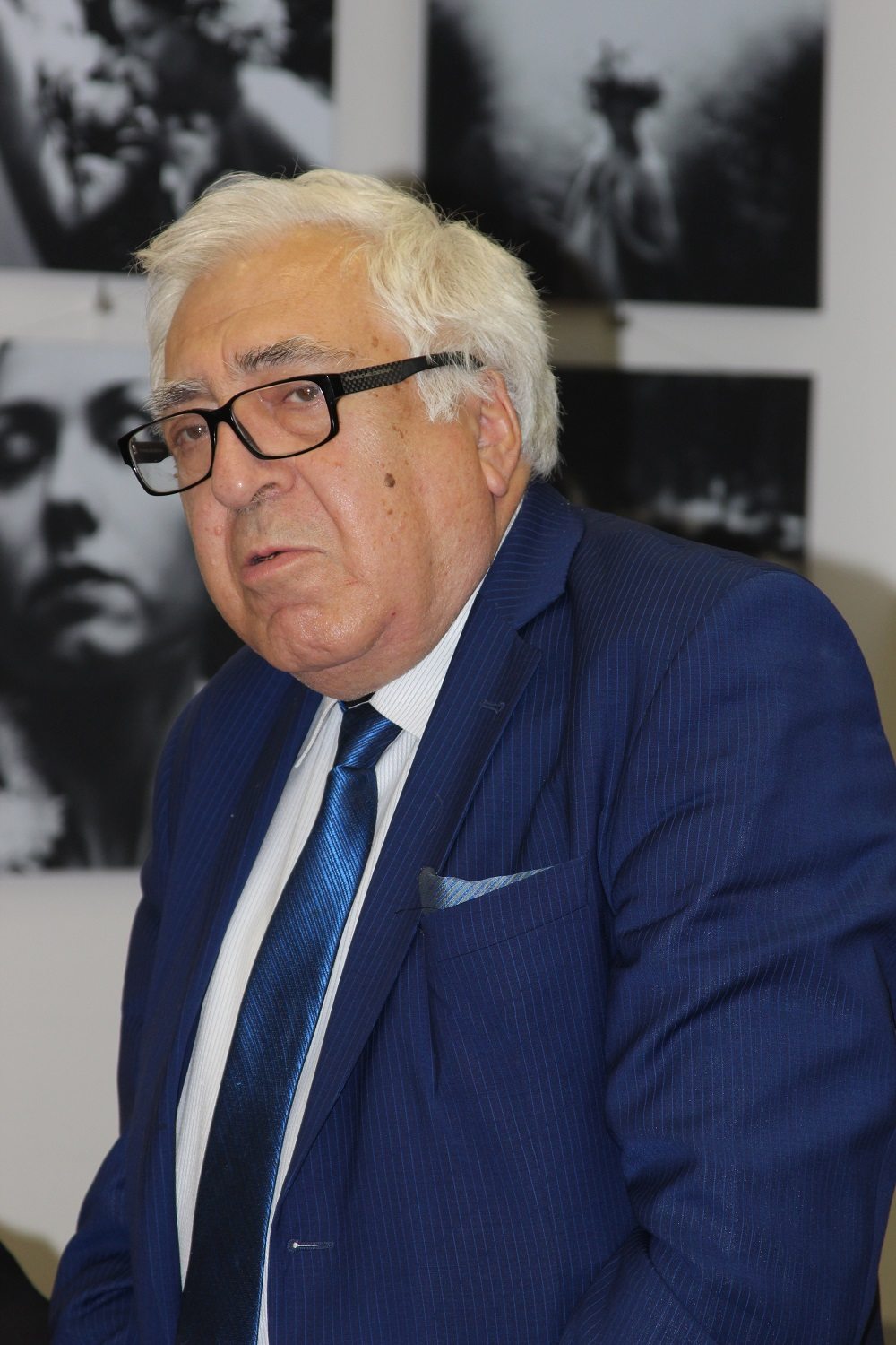 Народный писатель Азербайджана Анар